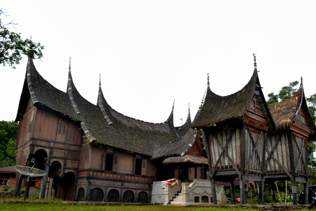 Rumah Gadang Baanjuang Dt. Bandaro Kuniang (Pucuak Bulek Bodi Caniago) yang berada di Kaum Sumagek Lurah, Kuburajo, Limo Kaum.